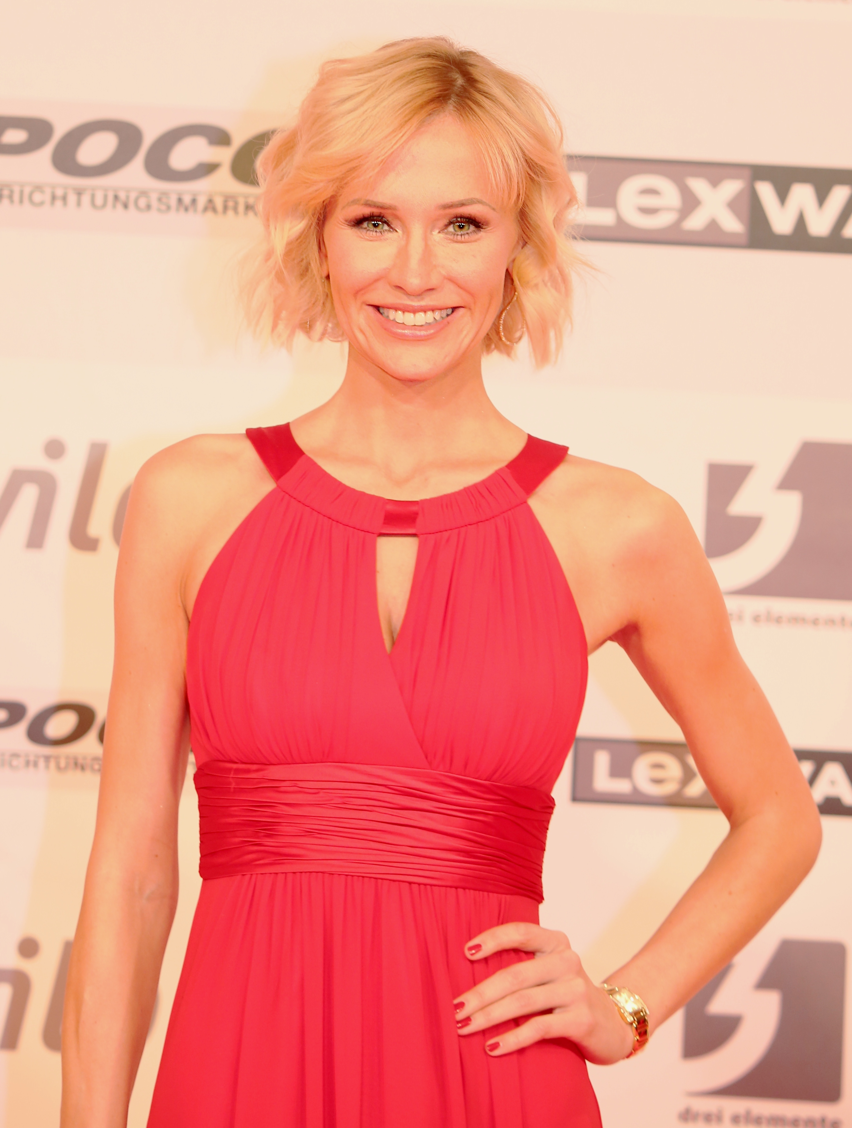 Lisa Loch bei der Kinderlachen-Gala 2017, in Dortmund.